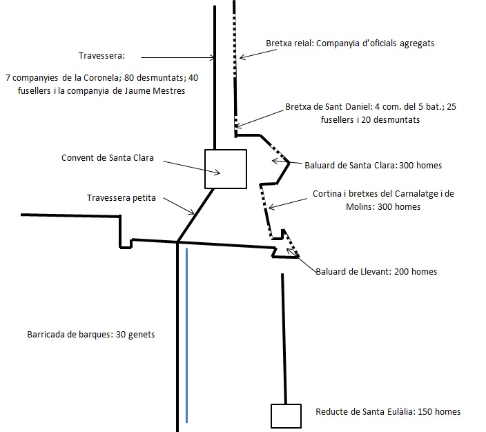 Desplegament inicial dels defensors en el sectors centre i dreta el dia 11 de setembre de 1714.